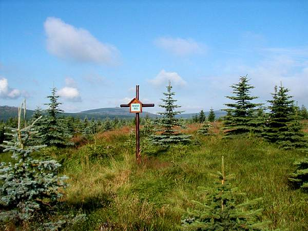 Hennrichův Kříž pod Pytláckými kameny, Jizera Mountains, district Liberec, Czech Republic Autor:Prazak